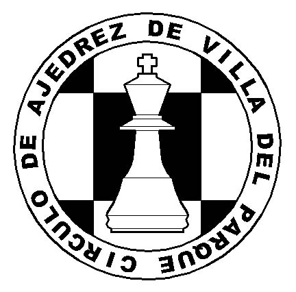 Logo del Circulo de Ajedrez de Villa del Parque